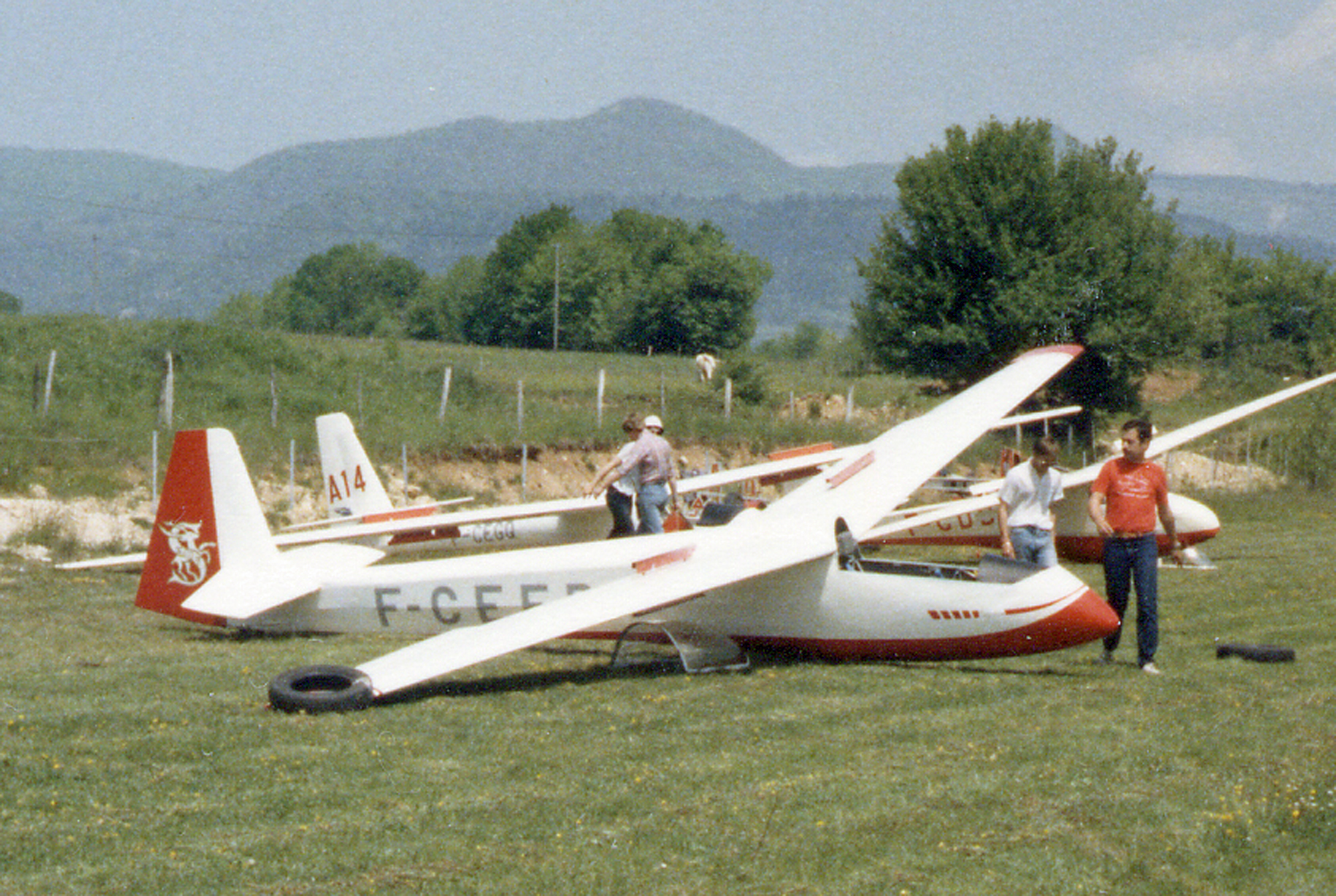 Topaze sur le terrain de Bellegarde-sur-Valserine